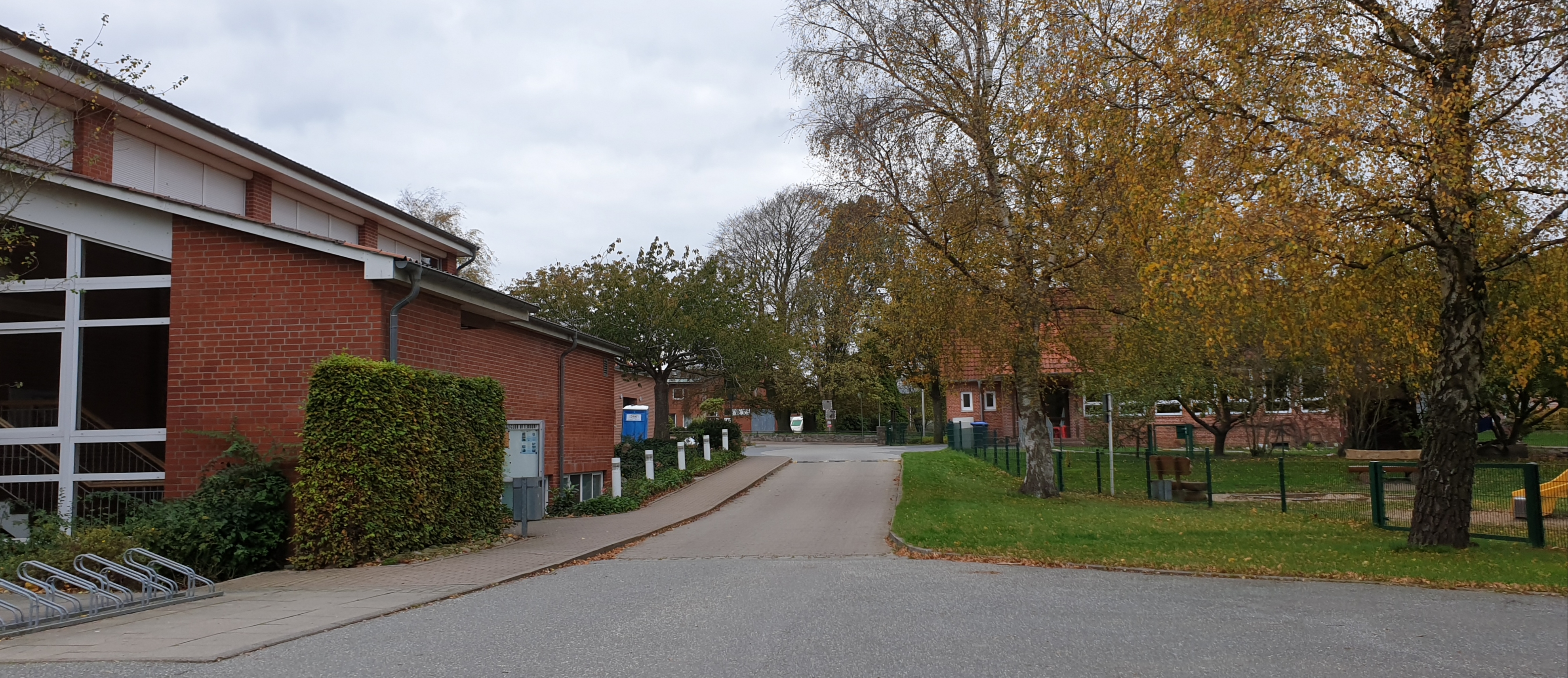 Ortsmitte mit Kindergarten und Feuerwehrhaus